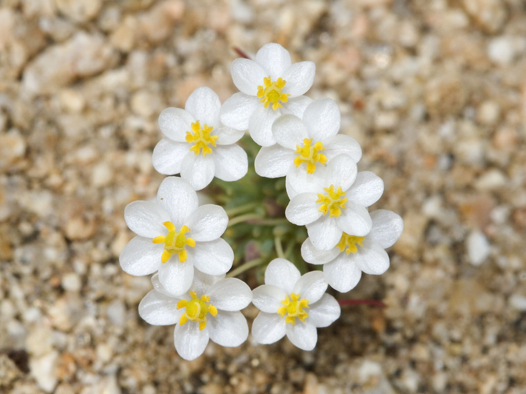 Canbya candida